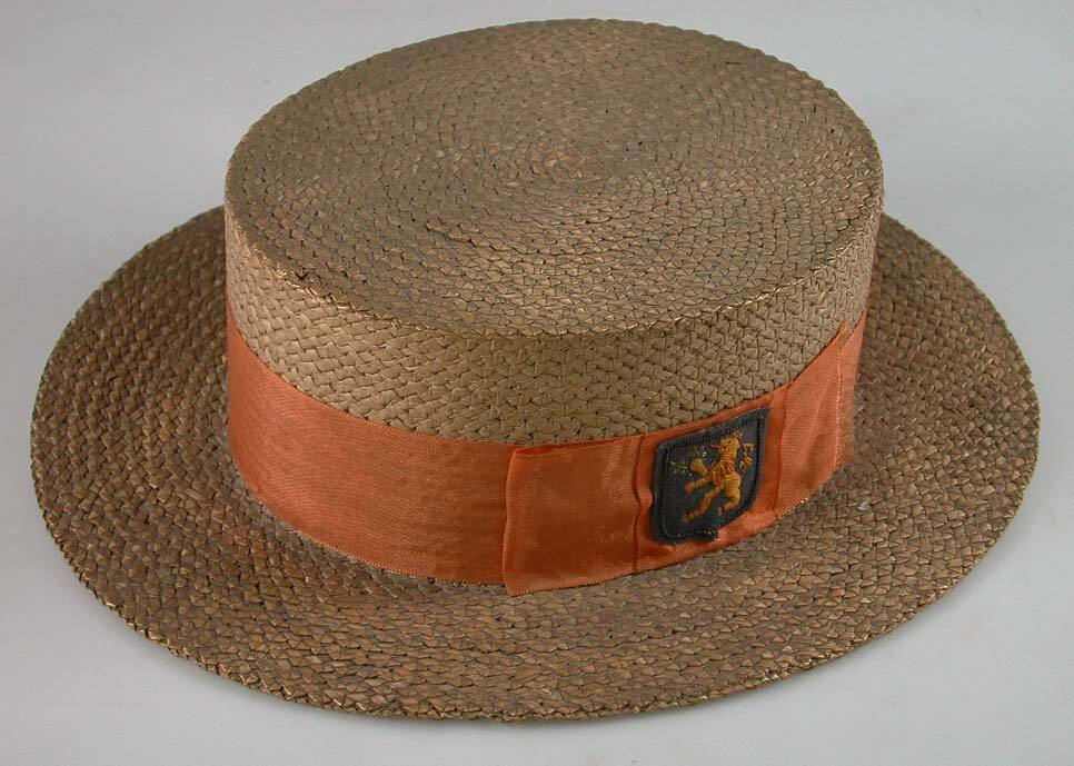 Hat from Ben Bril, part of the official costume of the Dutch team at the Olympic Summer Games 1928 in Amsterdam